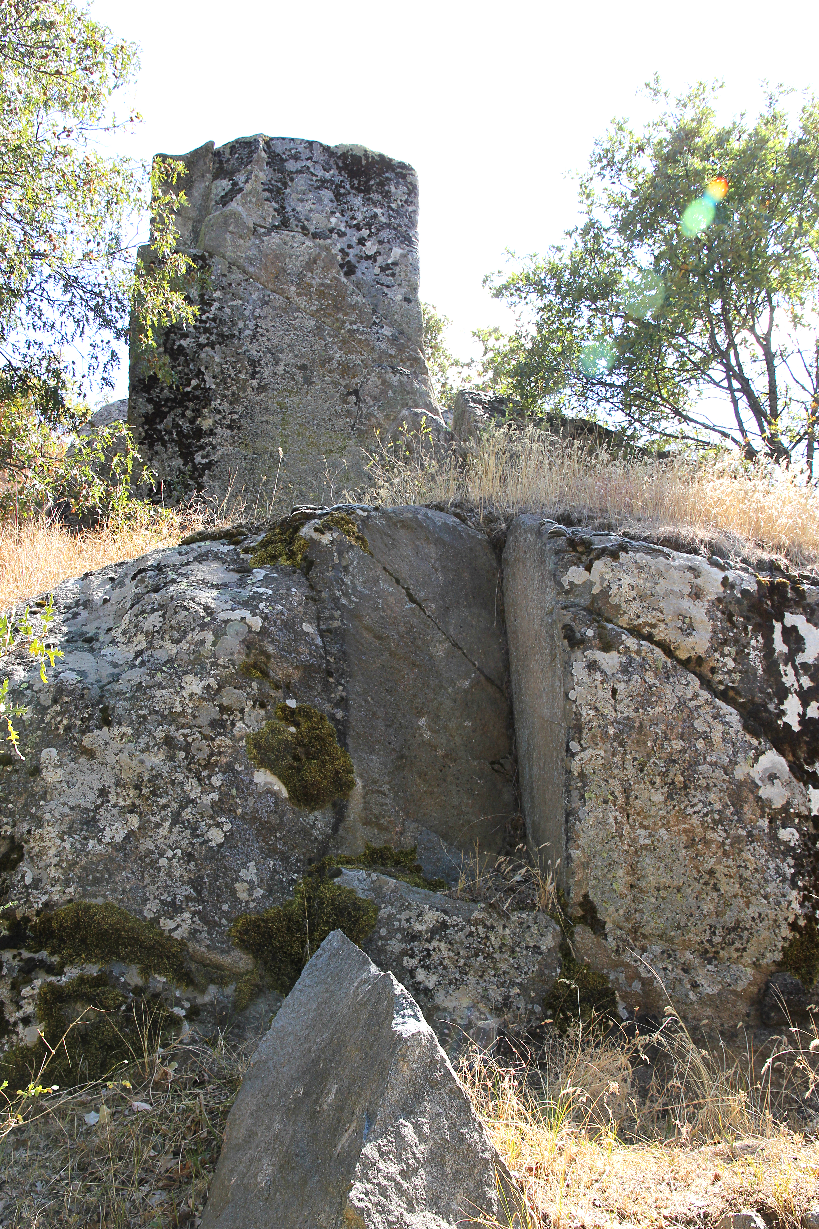 Hethitischer Steinbruch und Bildhauerwerkstatt bei Karakız, Zentraltürkei